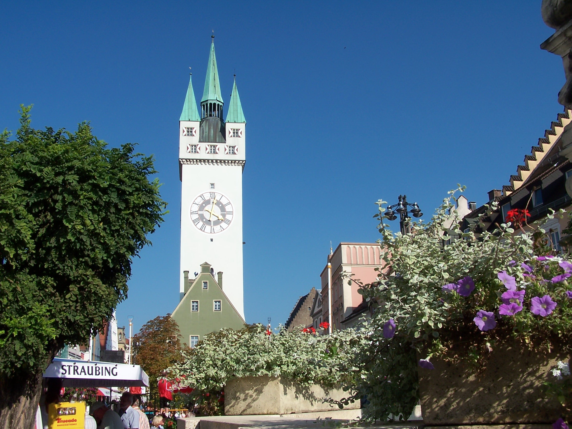 Straubing, Stadtturm. Freistehender achtgeschossiger Turm, Baubeginn 1316, zwischen 1379 und 1396 erhöht; mit historischer Ausstattung; Anbauten an der Ost- und Westseite (ehem. Stadtwaage, Trinkstube, Wache), 15. Jahrhundert.